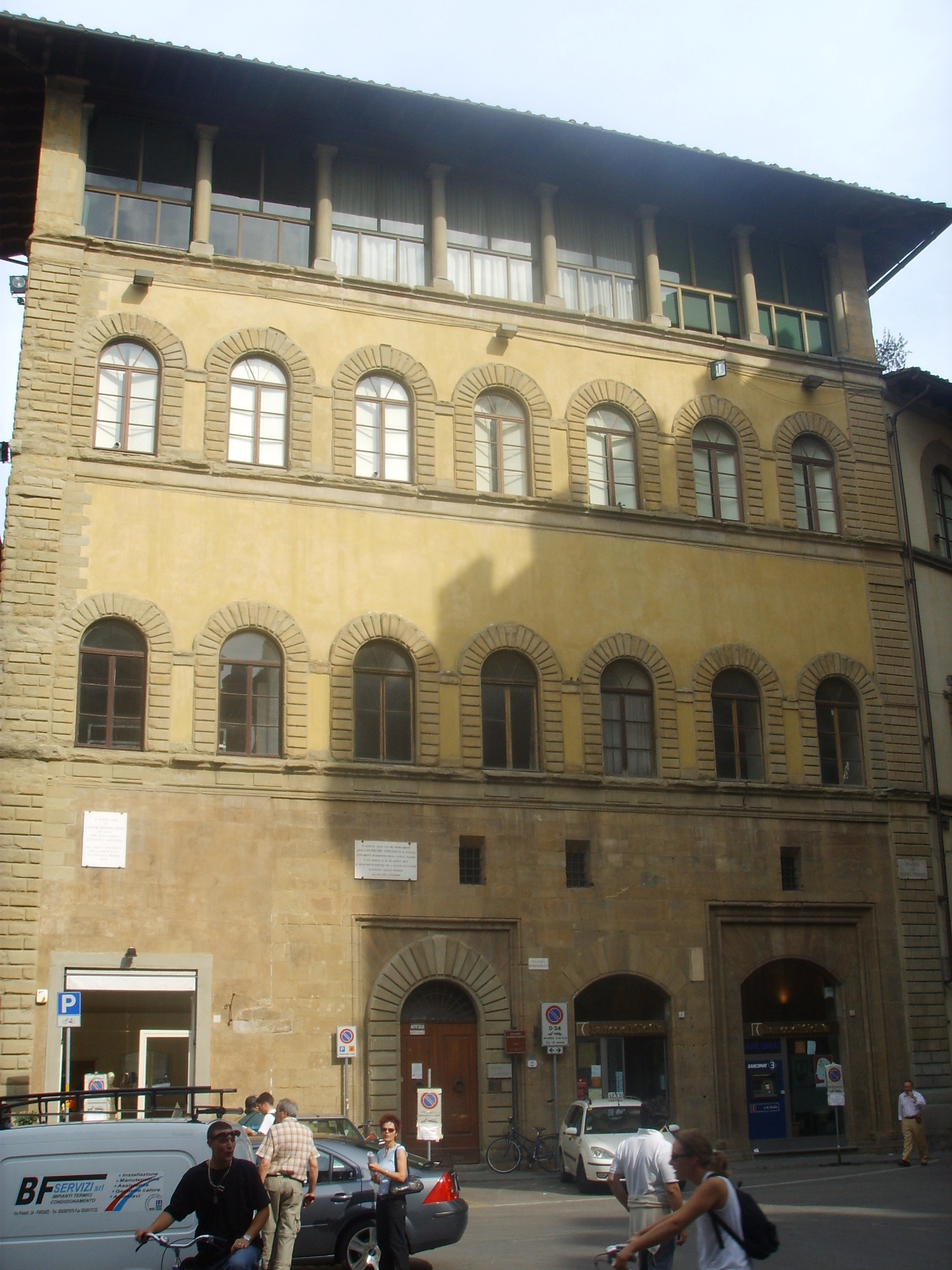 Palazzo Buondelmonti In Florence, italy